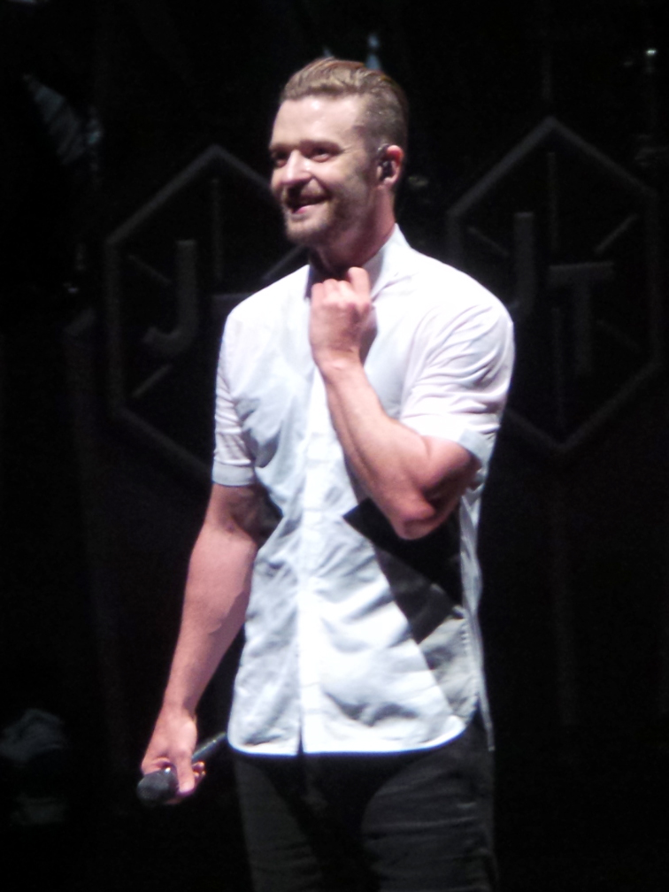 El músico estadounidense Justin Timberlake durante su gira The 2020 Experience World Tour en el recinto Time Warner Cable Arena de Charlotte, Carolina del Nortte, el 12 de julio de 2014.